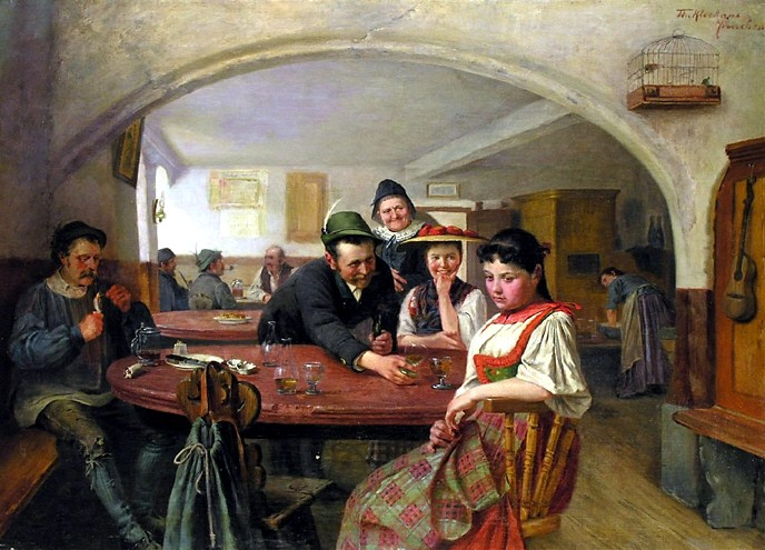 In der WirtsstubeIn the Innlabel QS:Lde,"In der Wirtsstube"label QS:Len,"In the Inn"